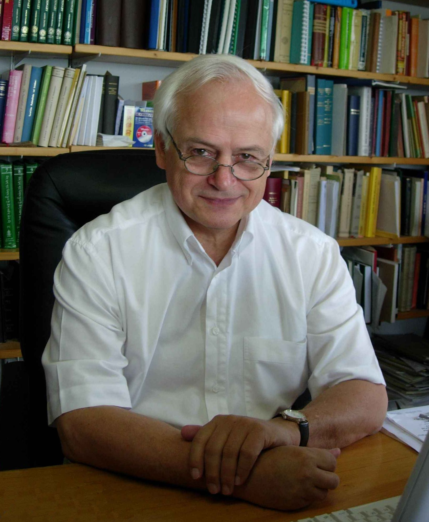 Prof. Dr. Michael Hahn (2006) Indologe und Tibetologe an der Philipps-Universität Marburg